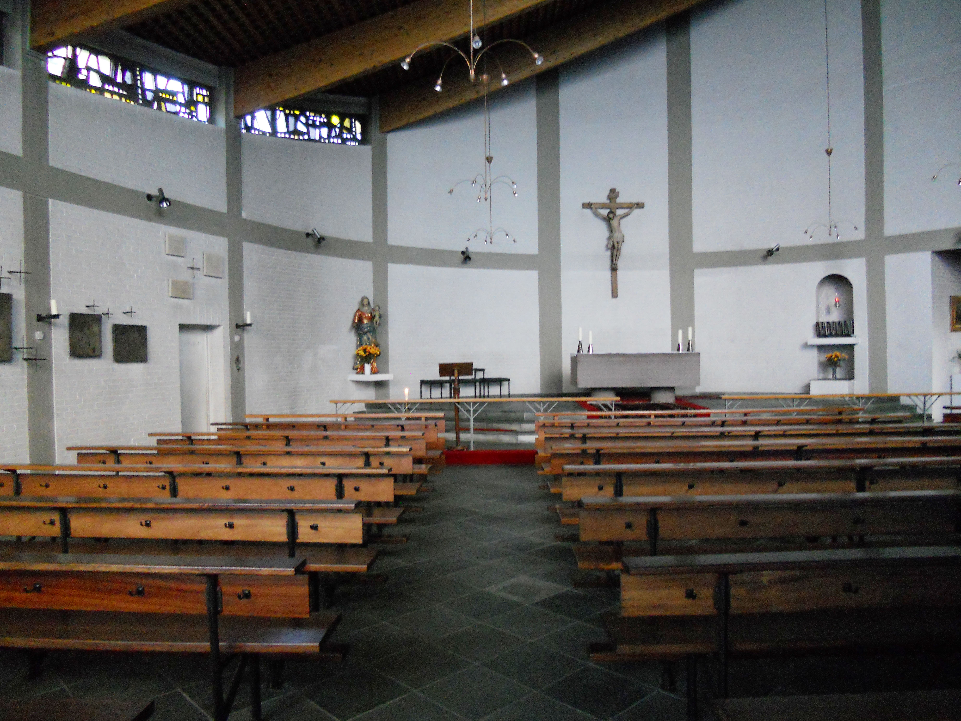 St. Laurentius, Glücksburg, Ansicht Schiff zum Altarraum